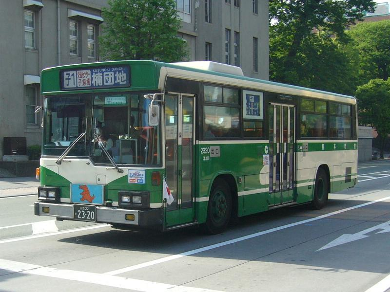 登録番号：熊本22か23-20 熊本市交通局所属